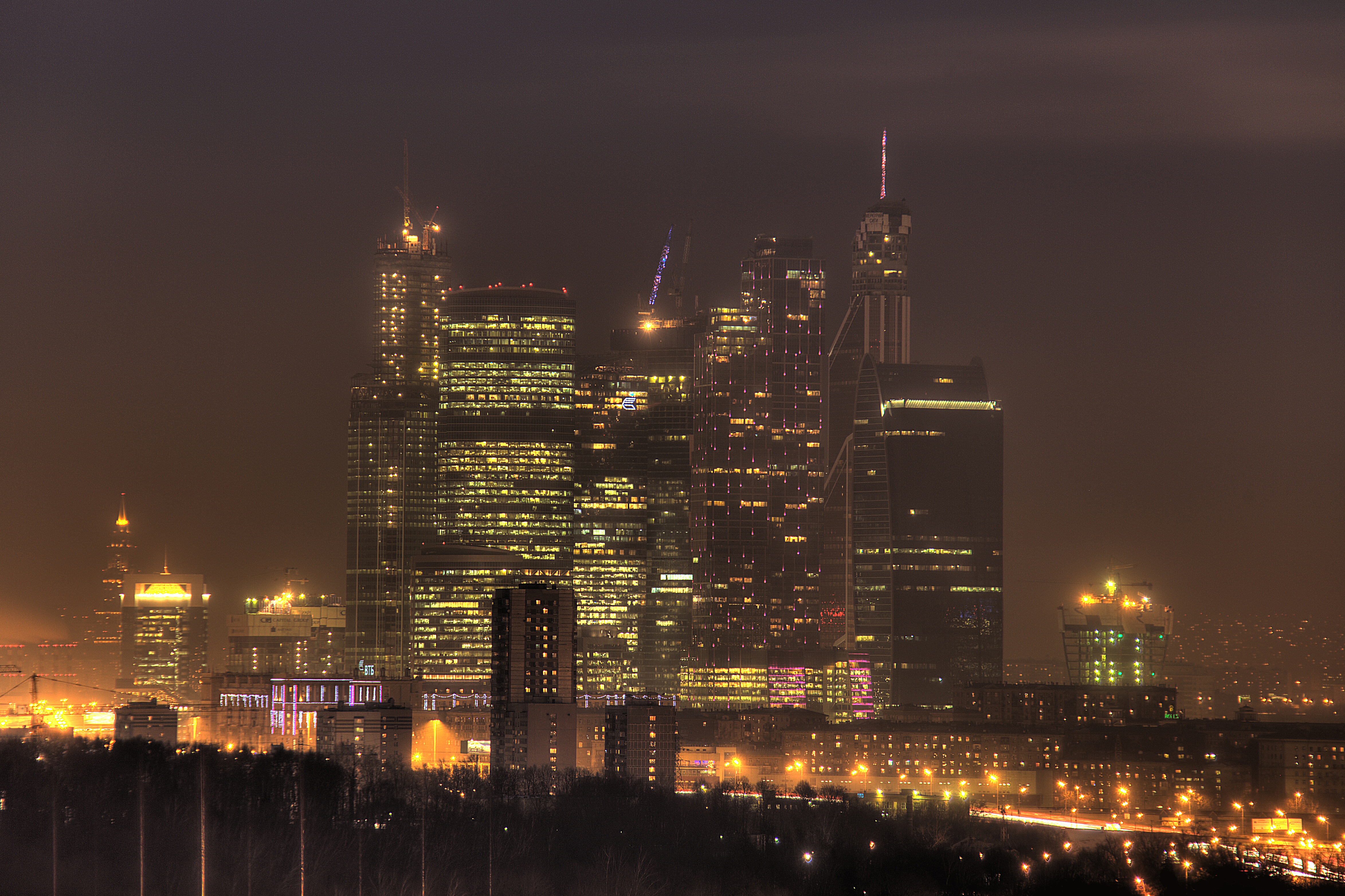 Москва-сити